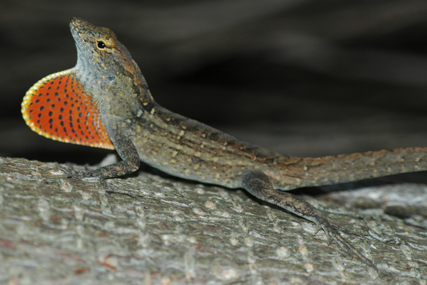 Anolis marron (Anolis sagrei) en Floride. Photo personnelle.